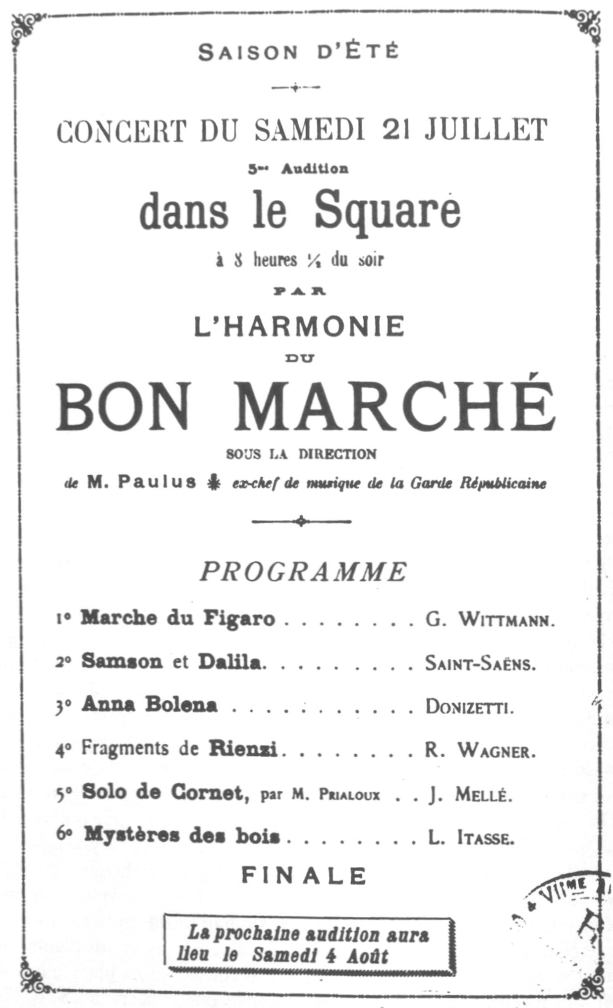 Programmzettel des Blasorchesters des Kaufhauses Bon Marché, 1894.